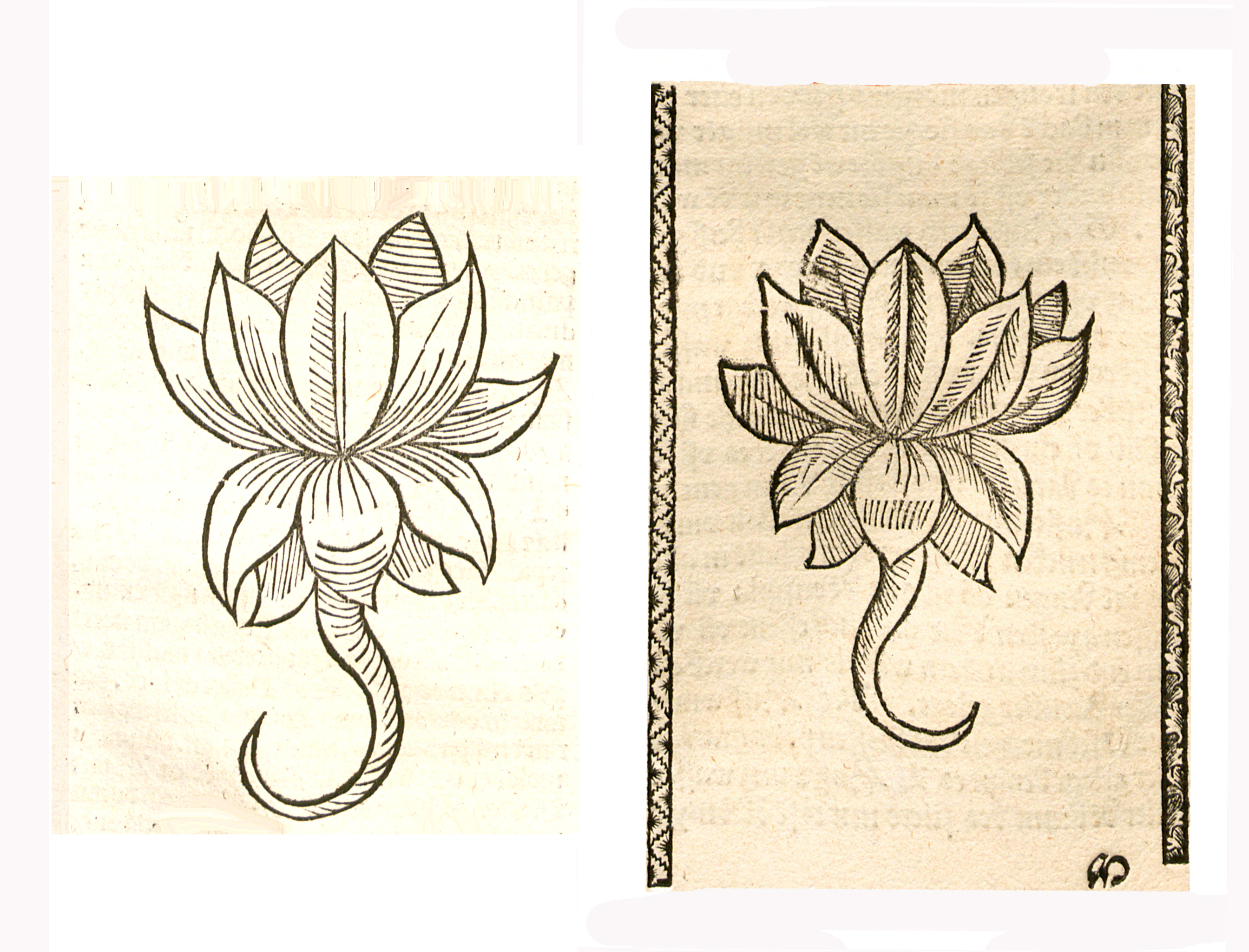 Abbildung von Huß Wurtz (Sempervivum tectorum)